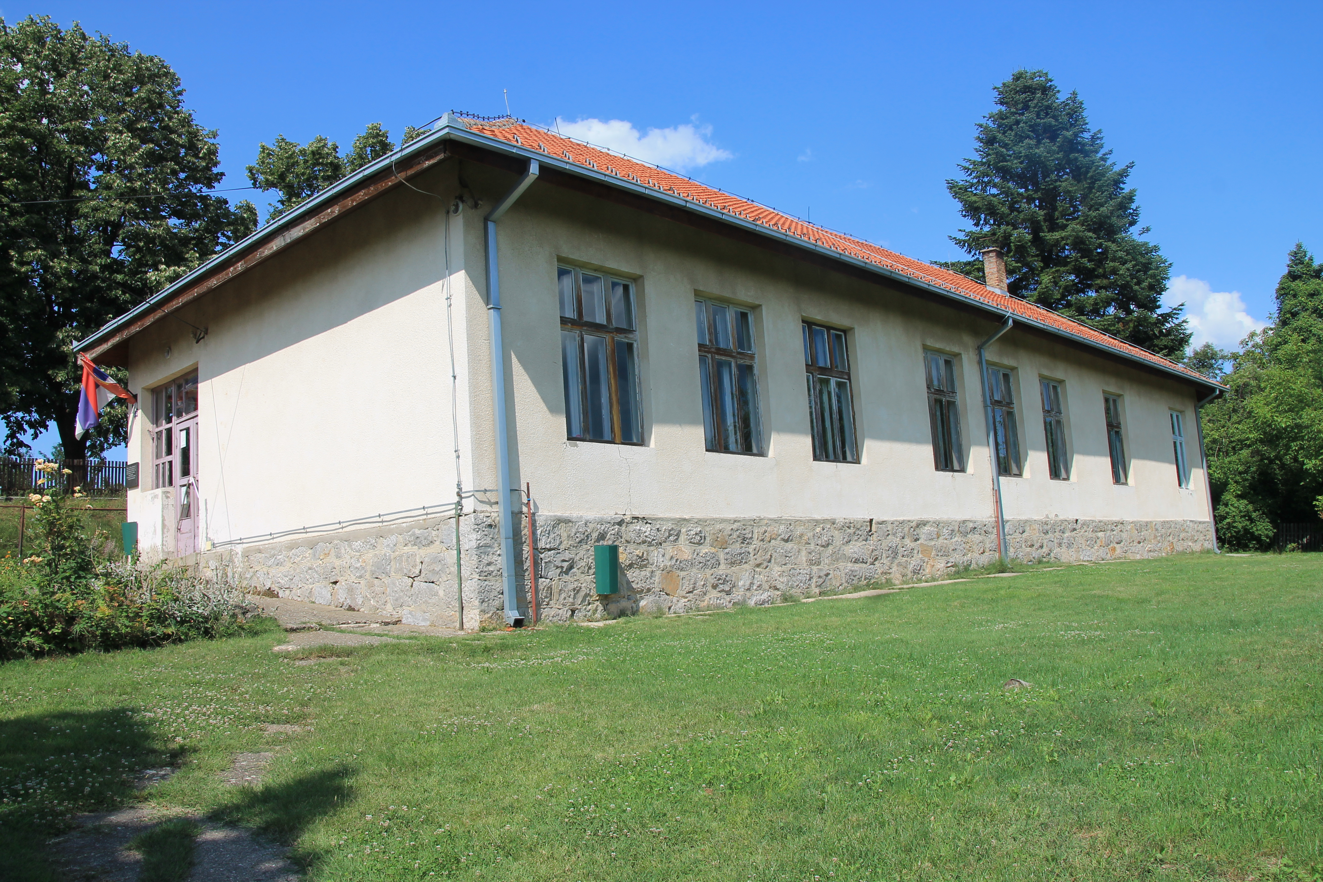 Barajevo